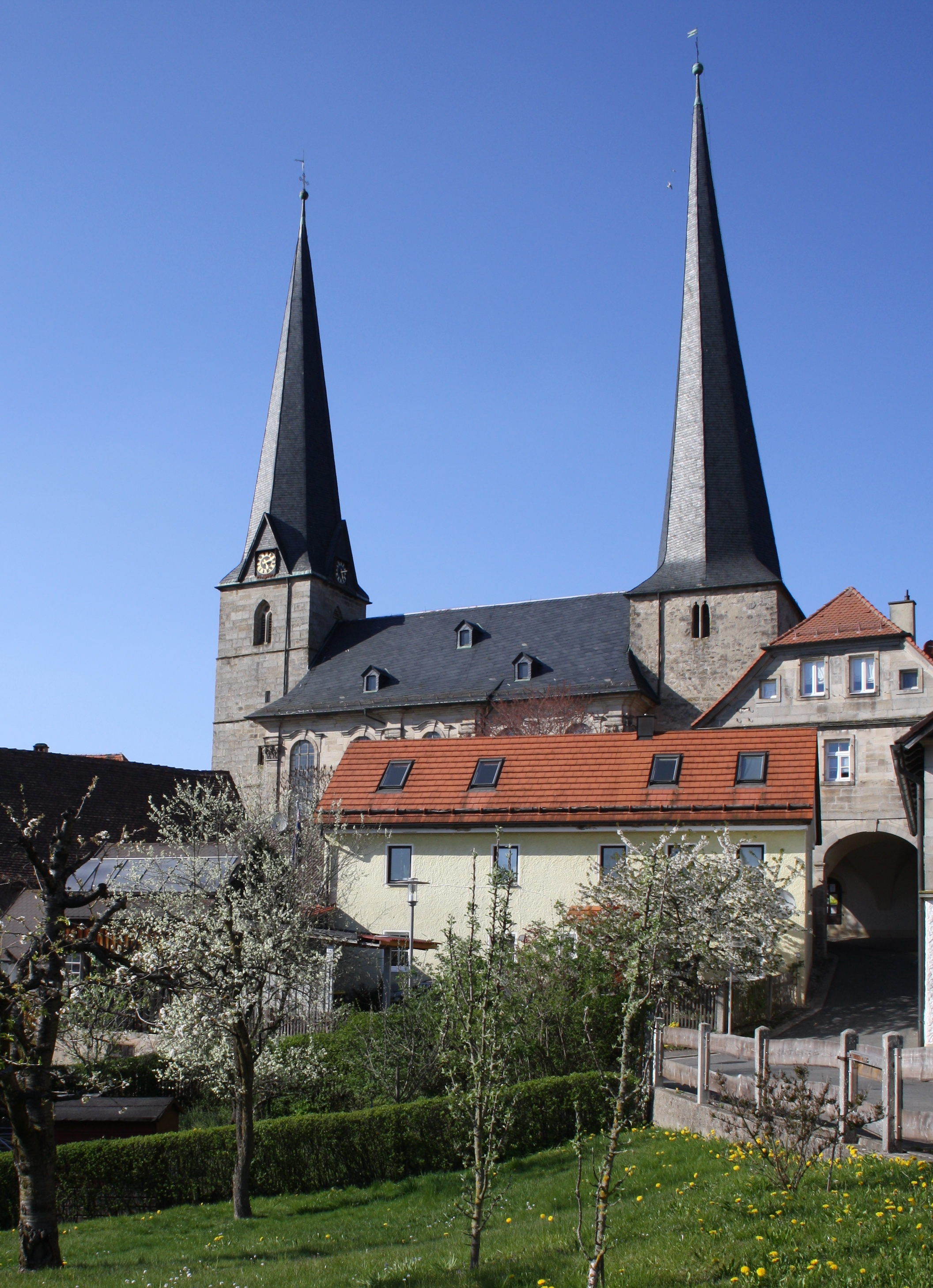 Kirche in Nemmersdorf (Oberfranken)